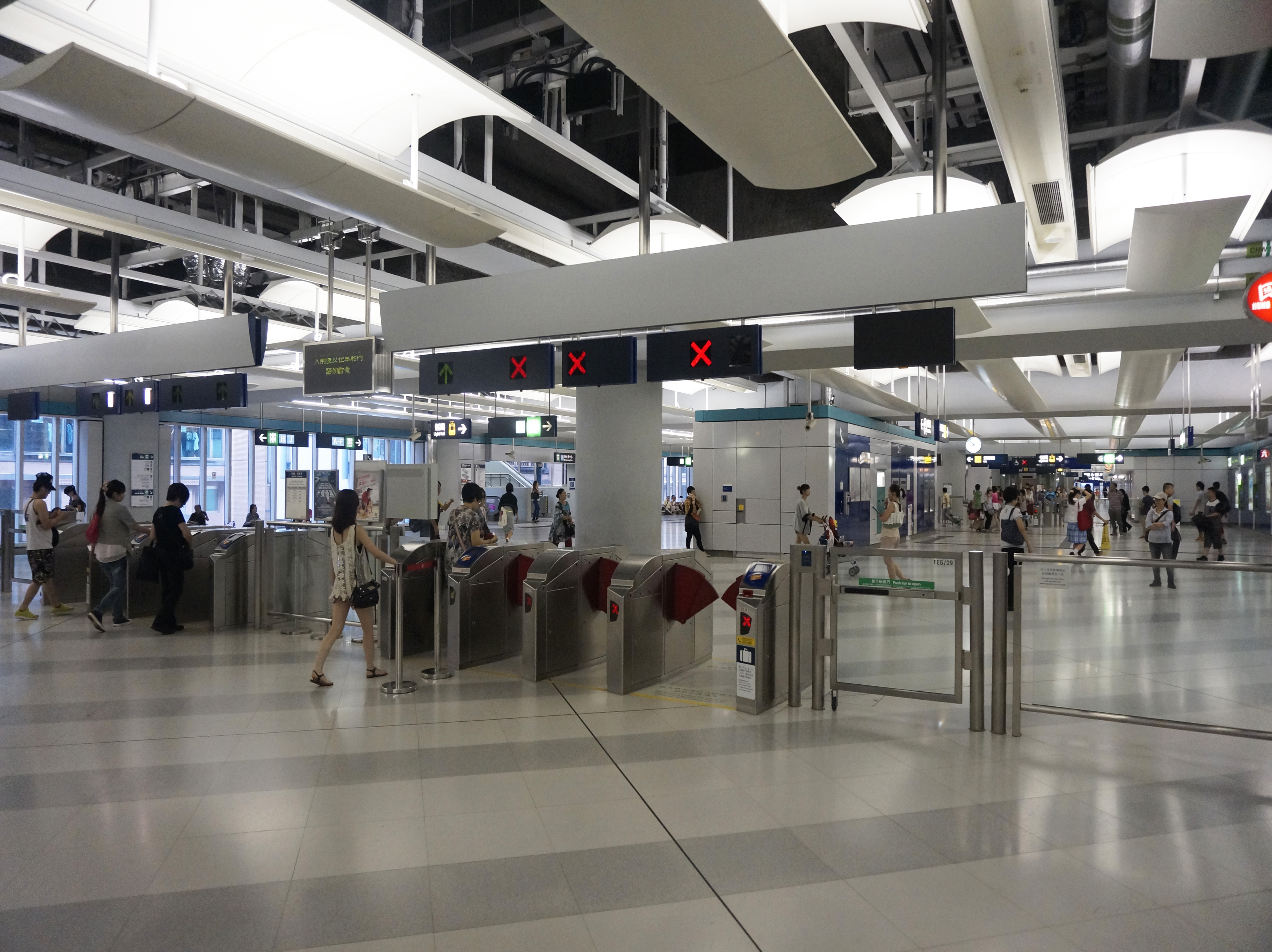 港鐵元朗站大堂